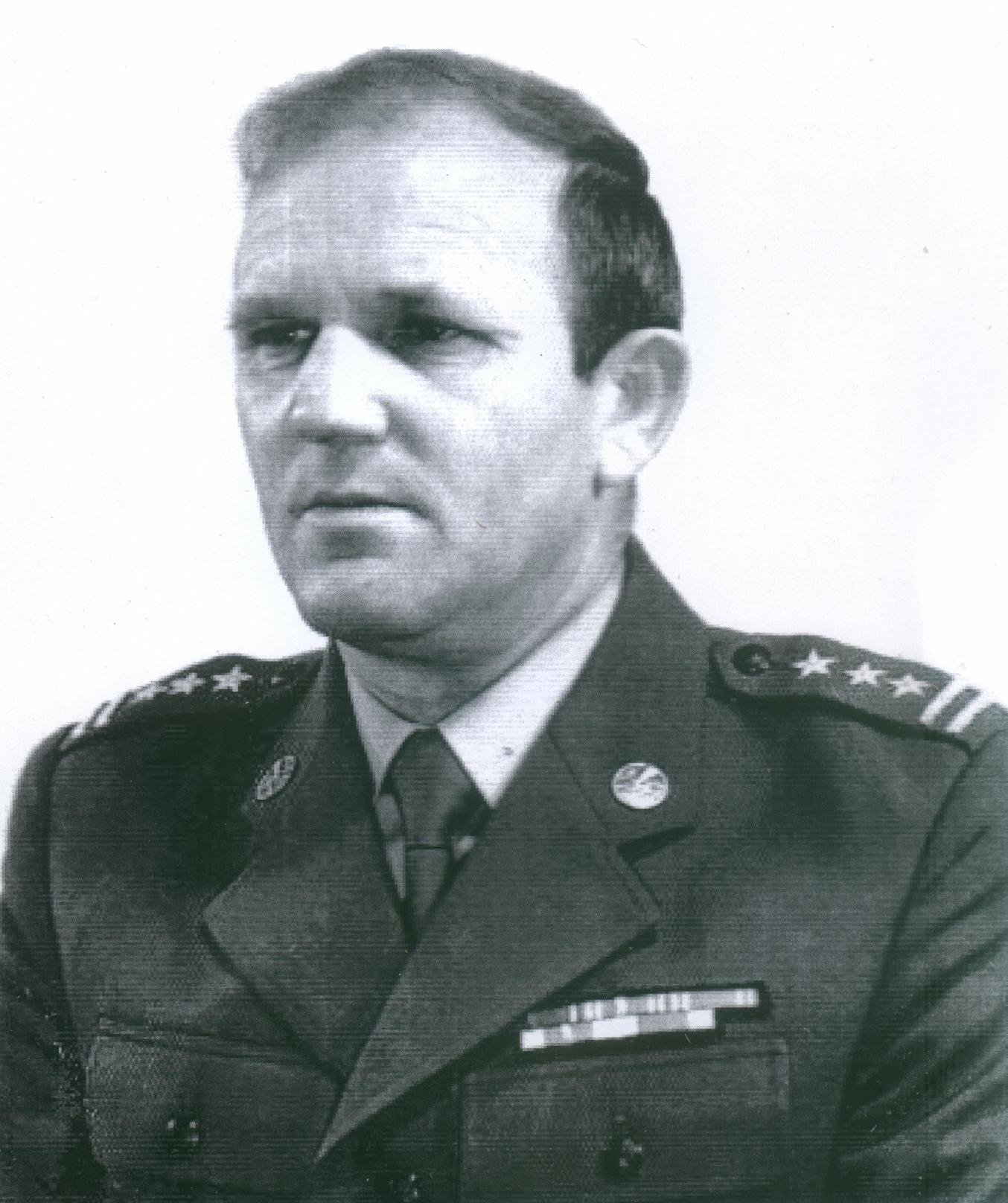 Dowódca Garnizonu Przasnysz 2001, jednocześnie dowódca JW 4420 płk Stanisław Krzyżanowski (1988-2002)